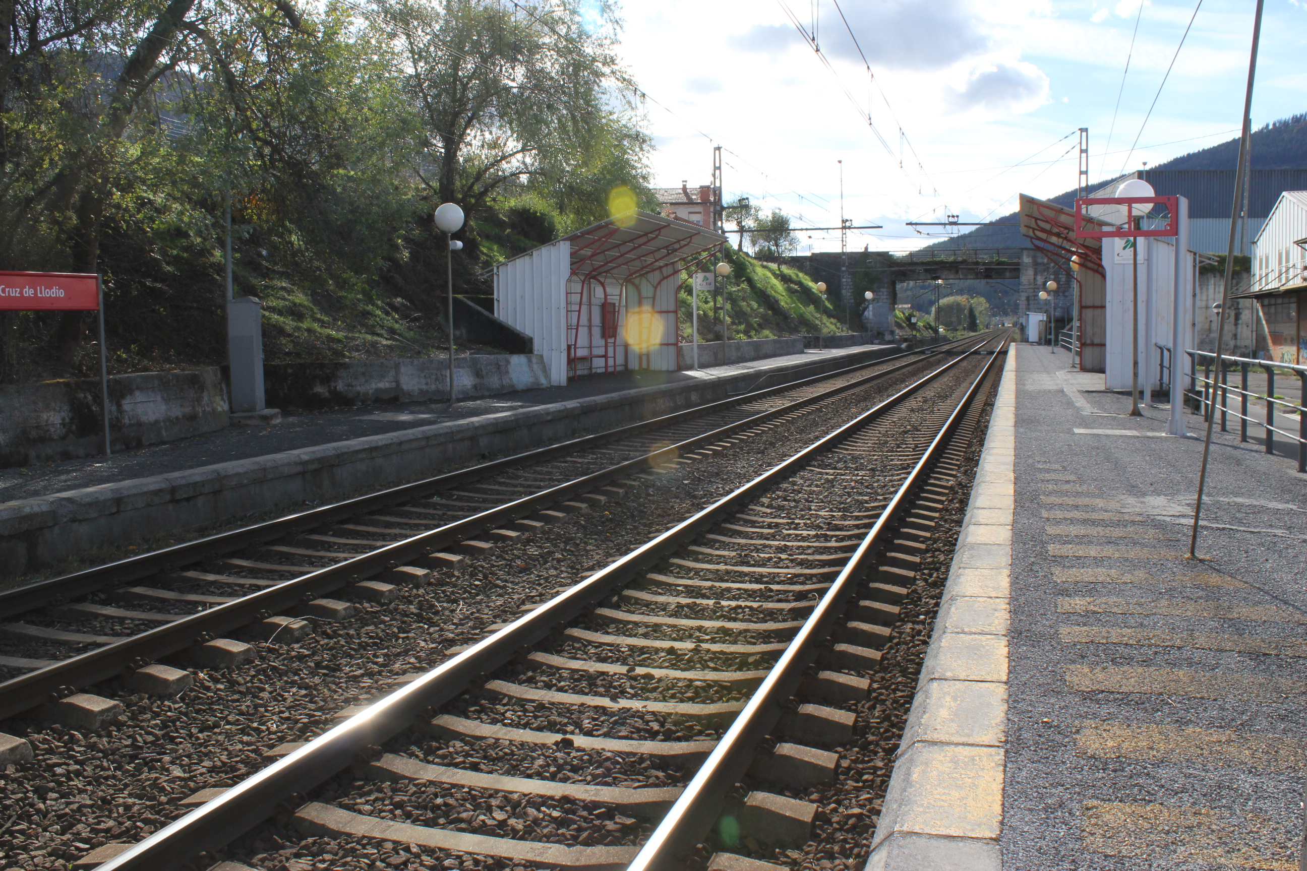 Estación de Santa Cruz de Llodio.